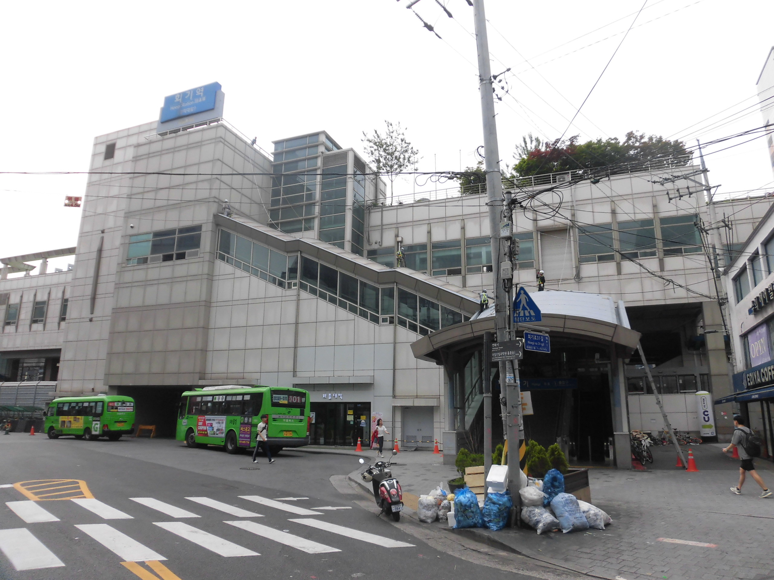 경원선 회기역 1번출구